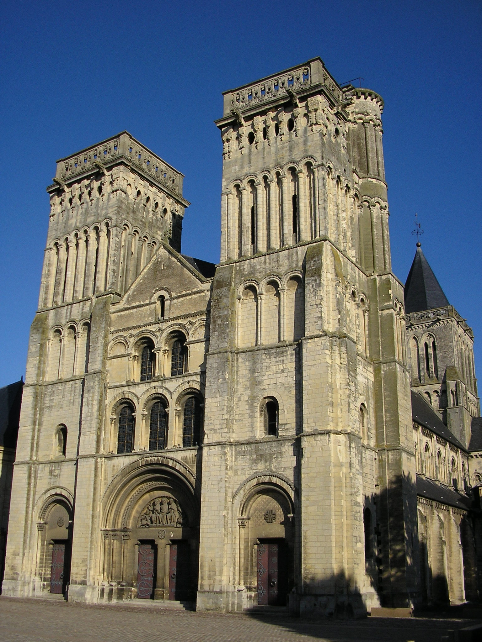 façade de l'abbaye aux Dames